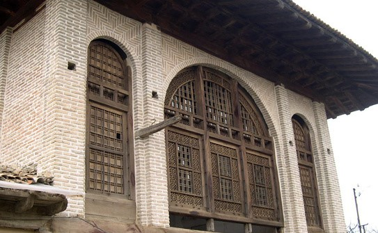 عمارت تاریخی رمدانی مربوط به دوران قاجار